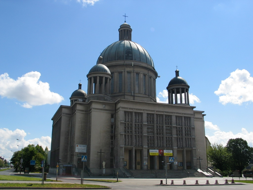 Kościół Św. Teresy i Jana Bosko w Łodzi